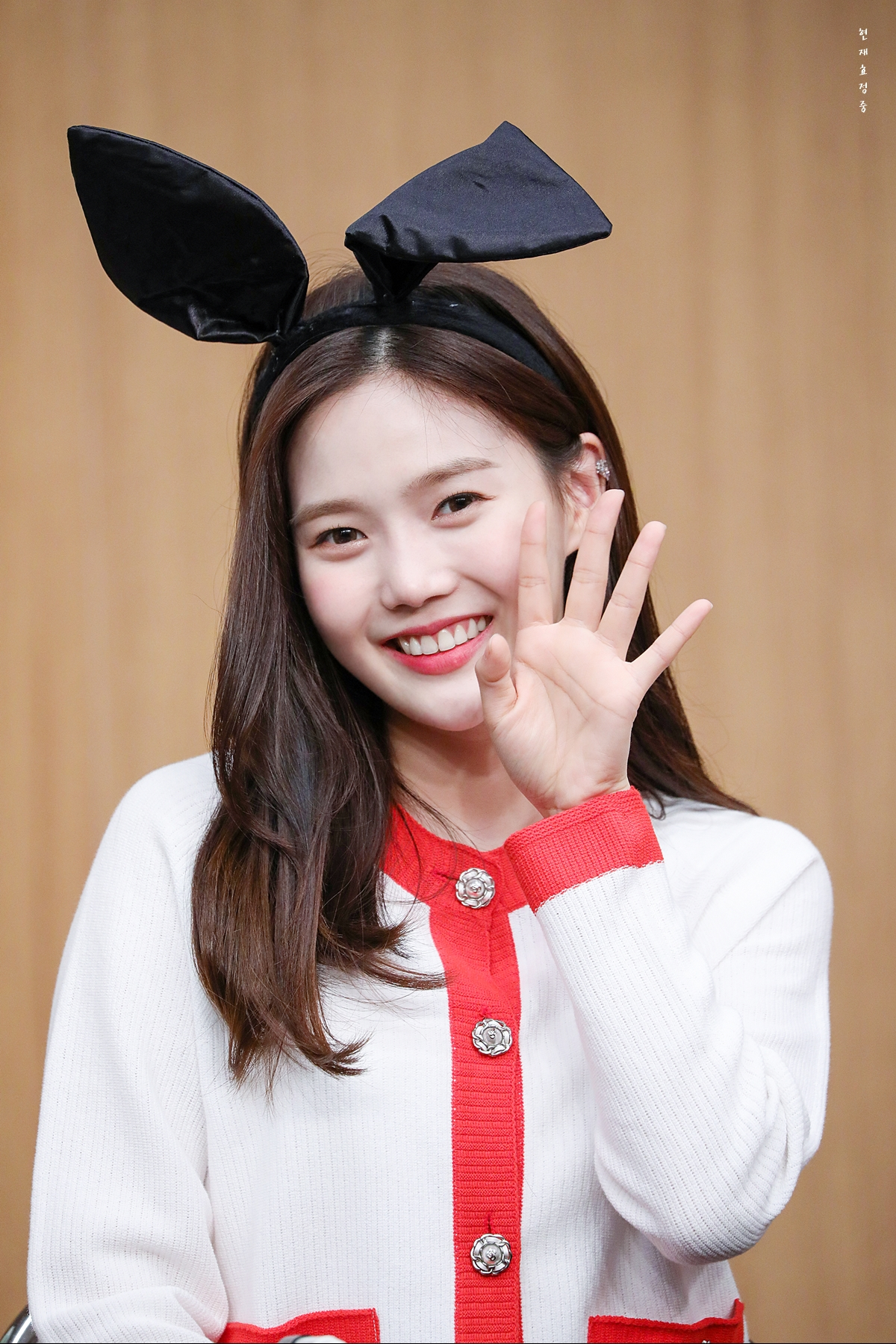 190623 TCC 아트센터 팬사인회 효정 (3)